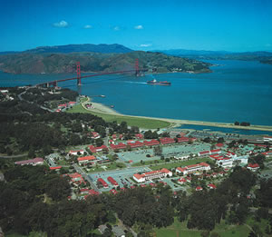 Presidio of San Francisco, aerial view